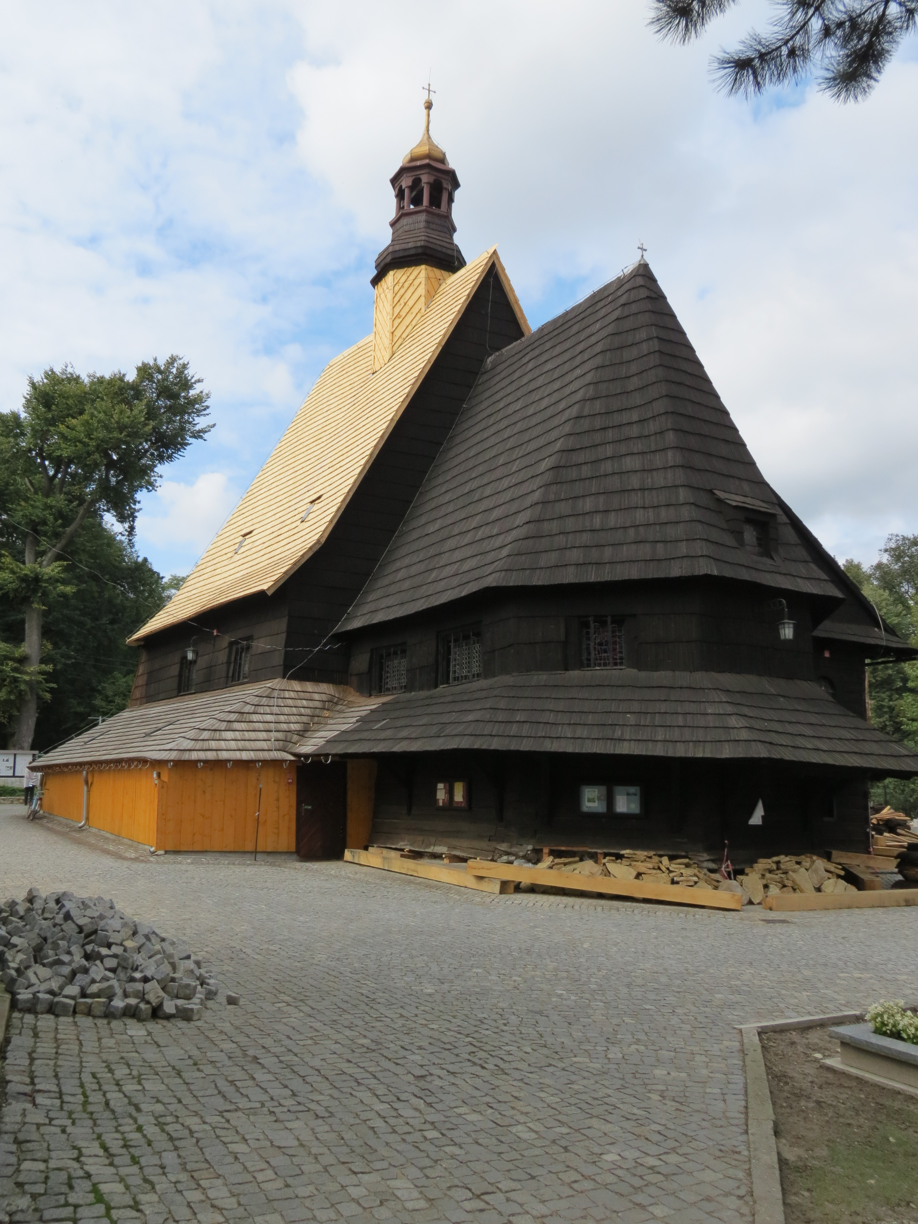 Kościół drewniany p. w. św. Jana Chrzciciela i dzwonnica; Poniszowice, gmina Rudziniec, powiat gliwicki